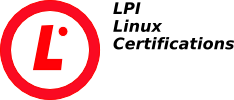 Linux Professional Institute Logo